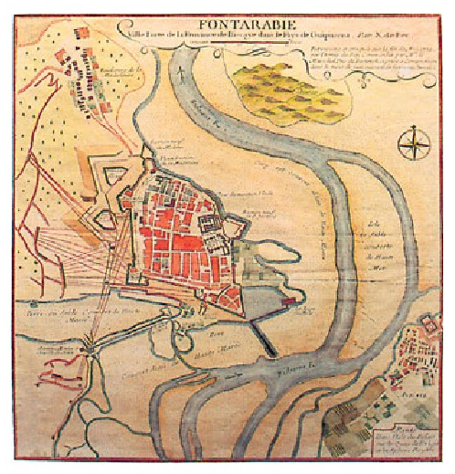 “Fontarabie”, Nicolas de Fer mapagileak XVIII. mendearen hasieran egina. Eskala handian militarrentzat egindako kartografiaren erakusgarri da. (Argazkia: J. G. Bilduma: J. R. S.).